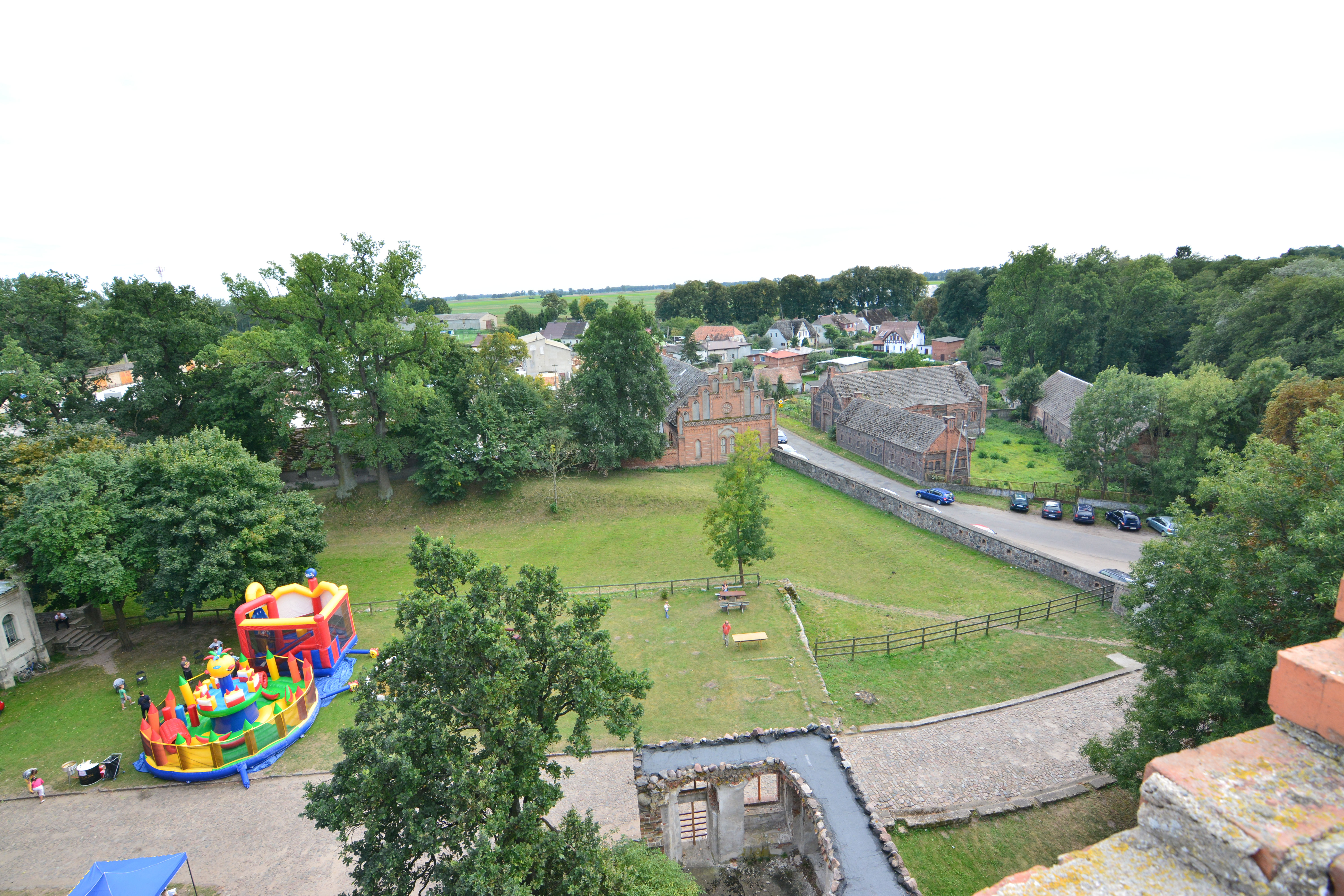 Pęzino - zamek, XIV, 1 poł. XVI, 1600, XIX